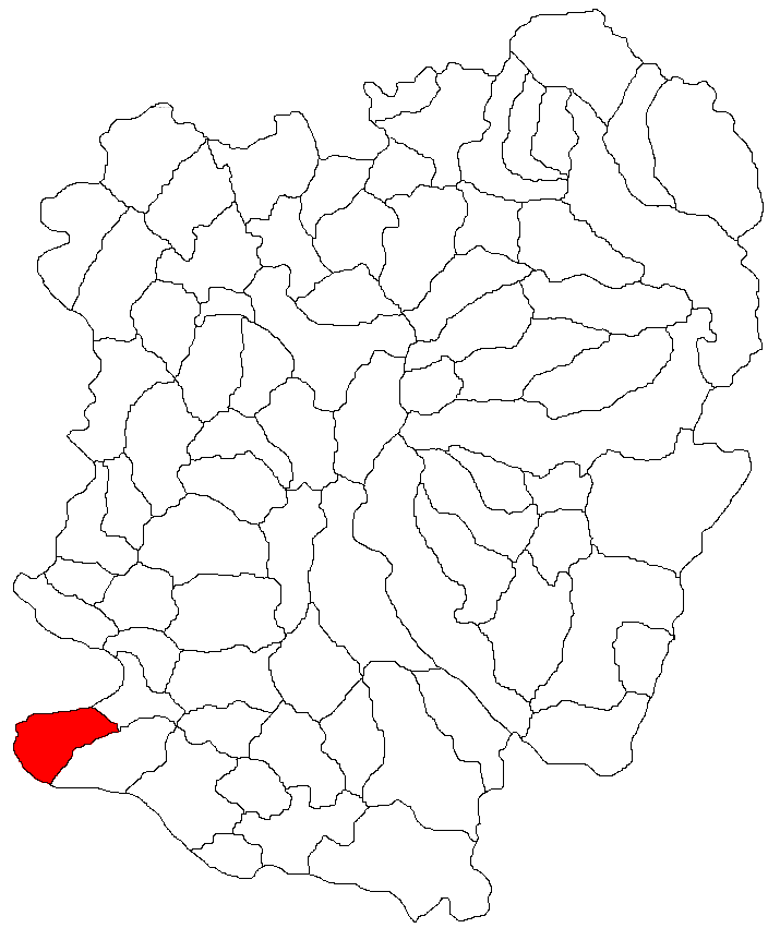 Categorie:Hărţi ale judeţului Caraş-Severin